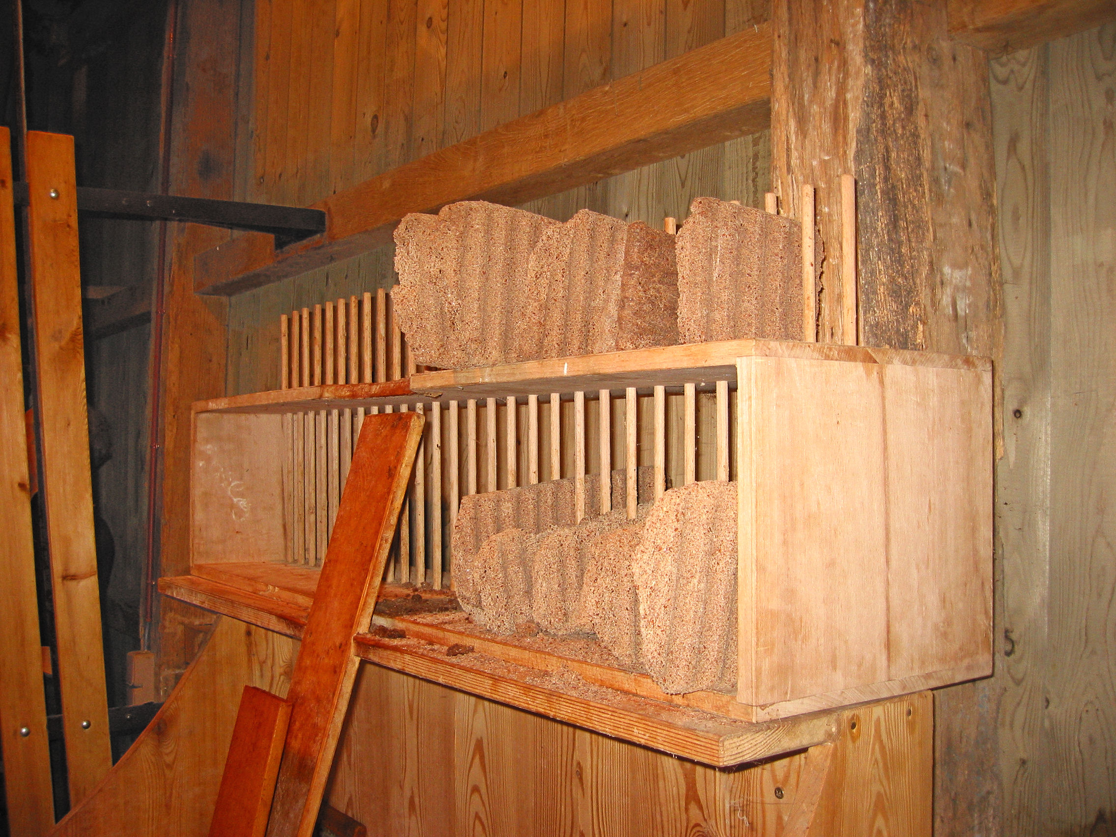 Collse Watermolen, oliekoeken, Eindhoven-Tongelre, the Netherlands